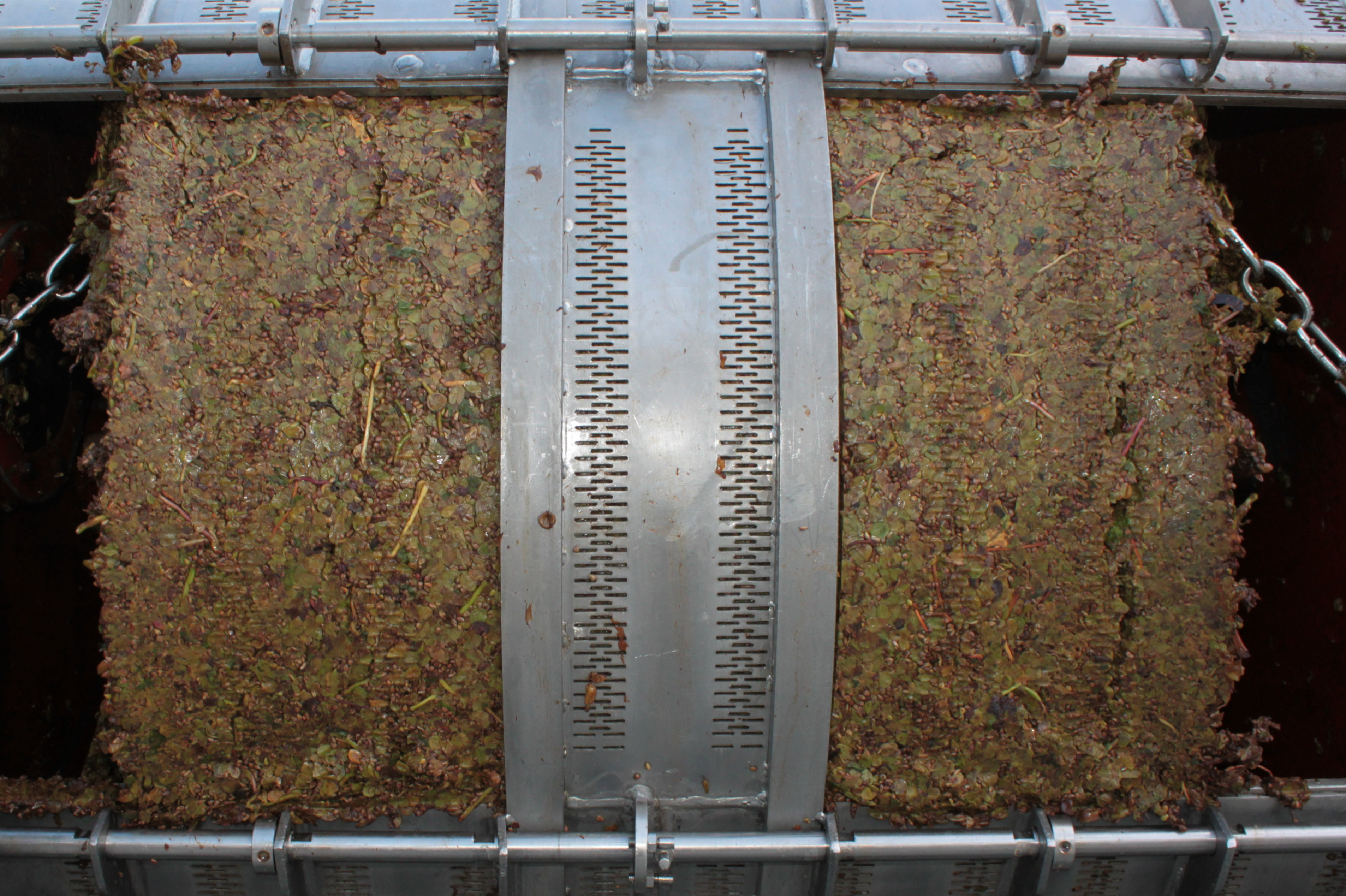 Muscadet. La râpe : raisin compressé et vidé de son jus, non décompacté.